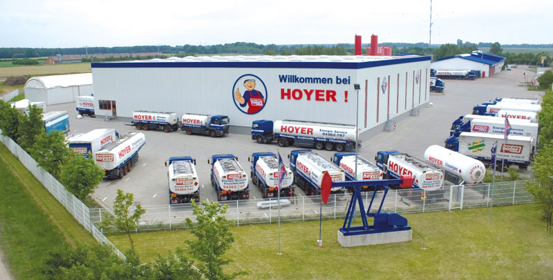 Die Hoyer Firmenzentrale in Visselhövede, Niedersachsen